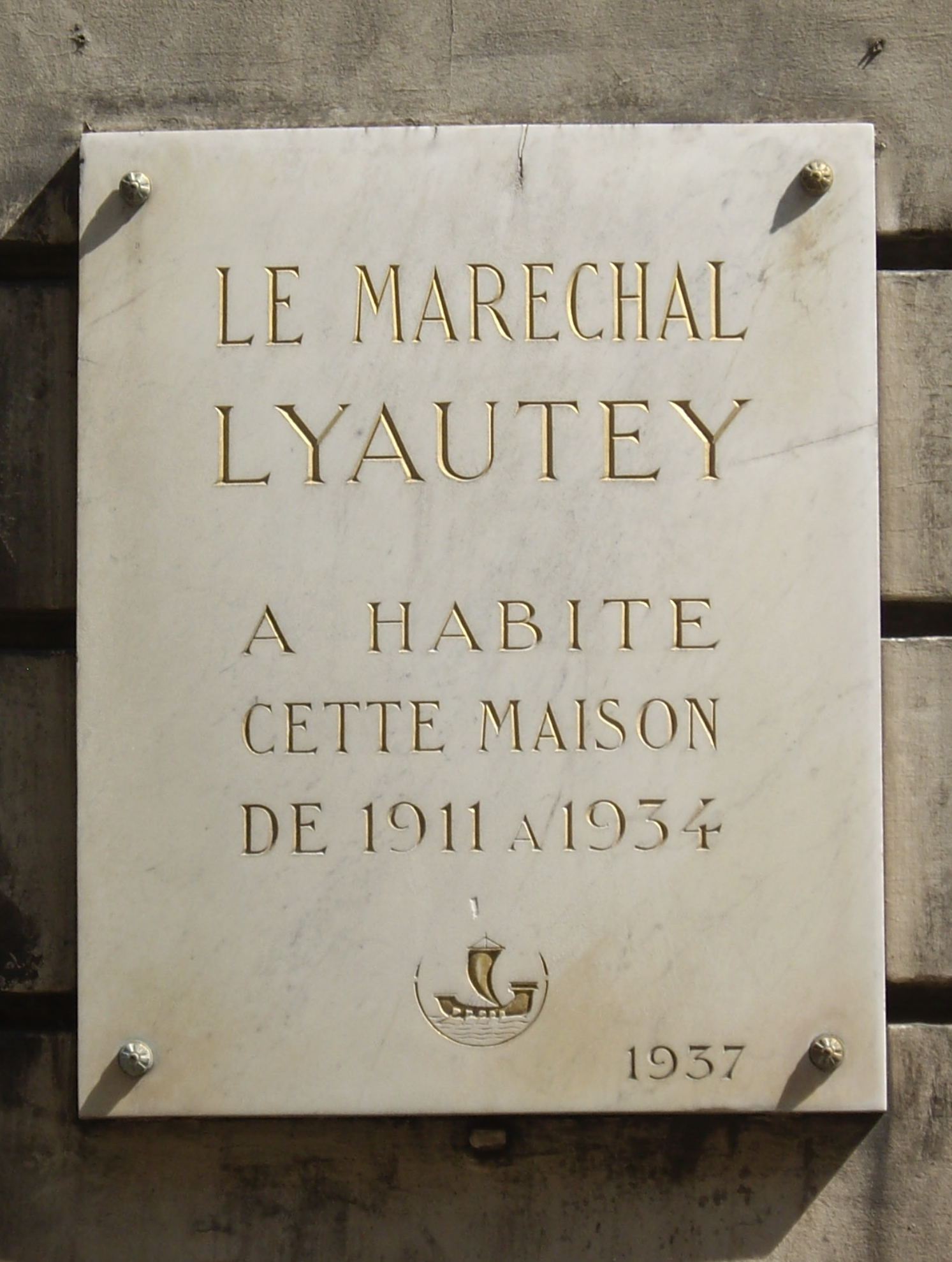 Plaque apposée au n° 5 de la rue Bonaparte, Paris 6e, où habita le maréchal Lyautey (1854-1934) de 1911 à 1934.